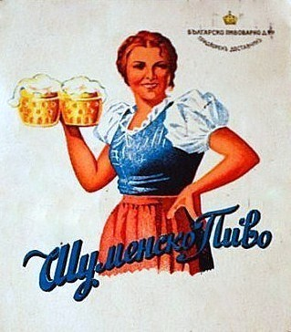 Рекламна картичка на "Шуменско пиво" , 1942 г.